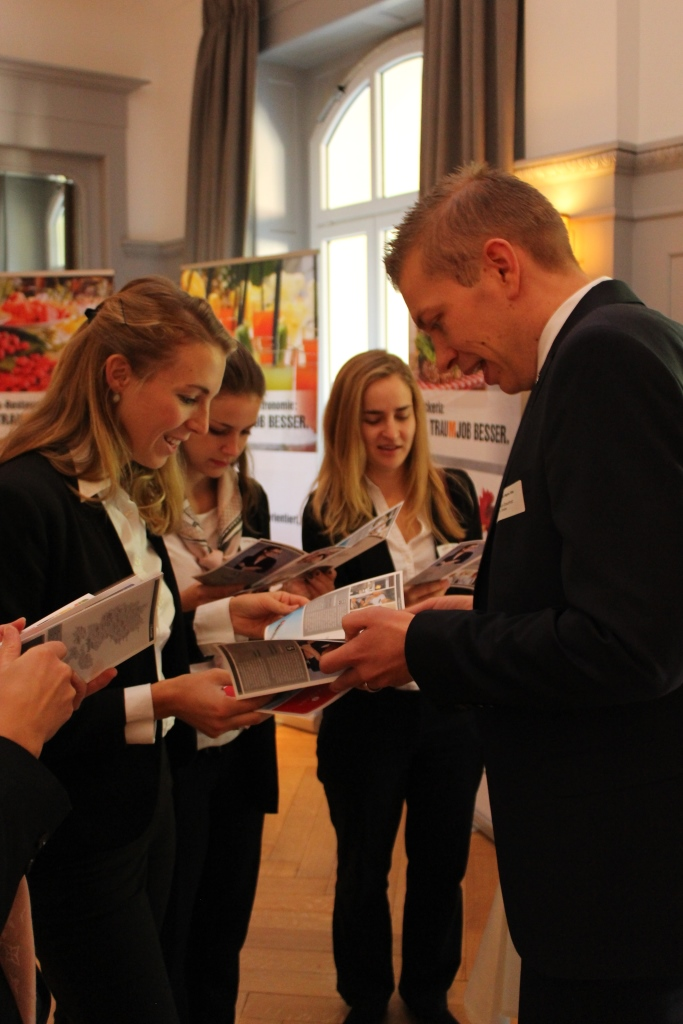 Am Career Day der SSTH erfolgreich Branchen-Kontakte knüpfen